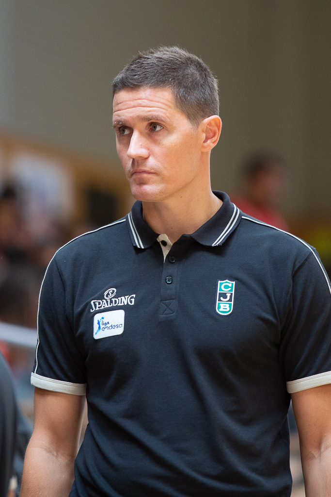 Jaka Lakovič en un partido de pretemporada entre el Divina Seguros Joventut y el Lassa Barça a Sant Julià de Vilatorta.